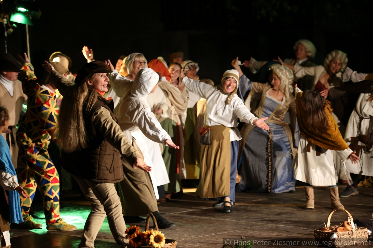 Schlussszene des Theaterstückes mit Gesang, Musik, Tanz und Schauspiel am Üsenberger Hof